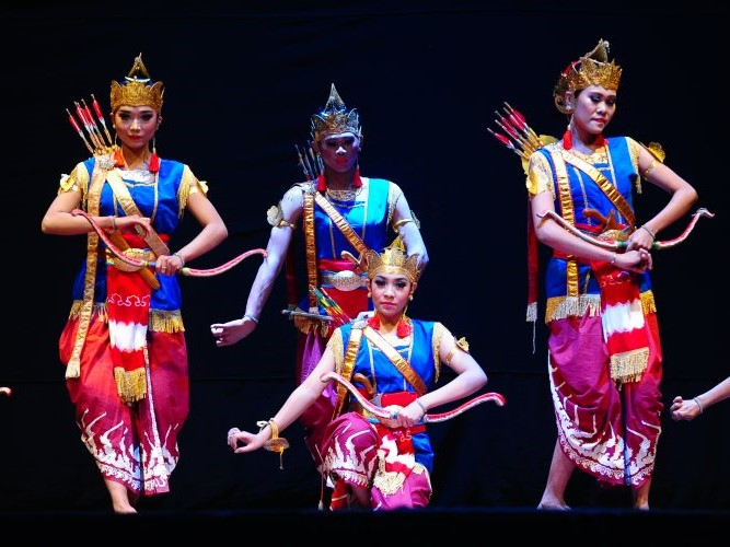 Tari Jurit Ampil Kridha Warastra merupakan tarian dari Kota Salatiga yang menceritakan tentang Perjanjian Salatiga pada tanggal 17 Maret 1757.